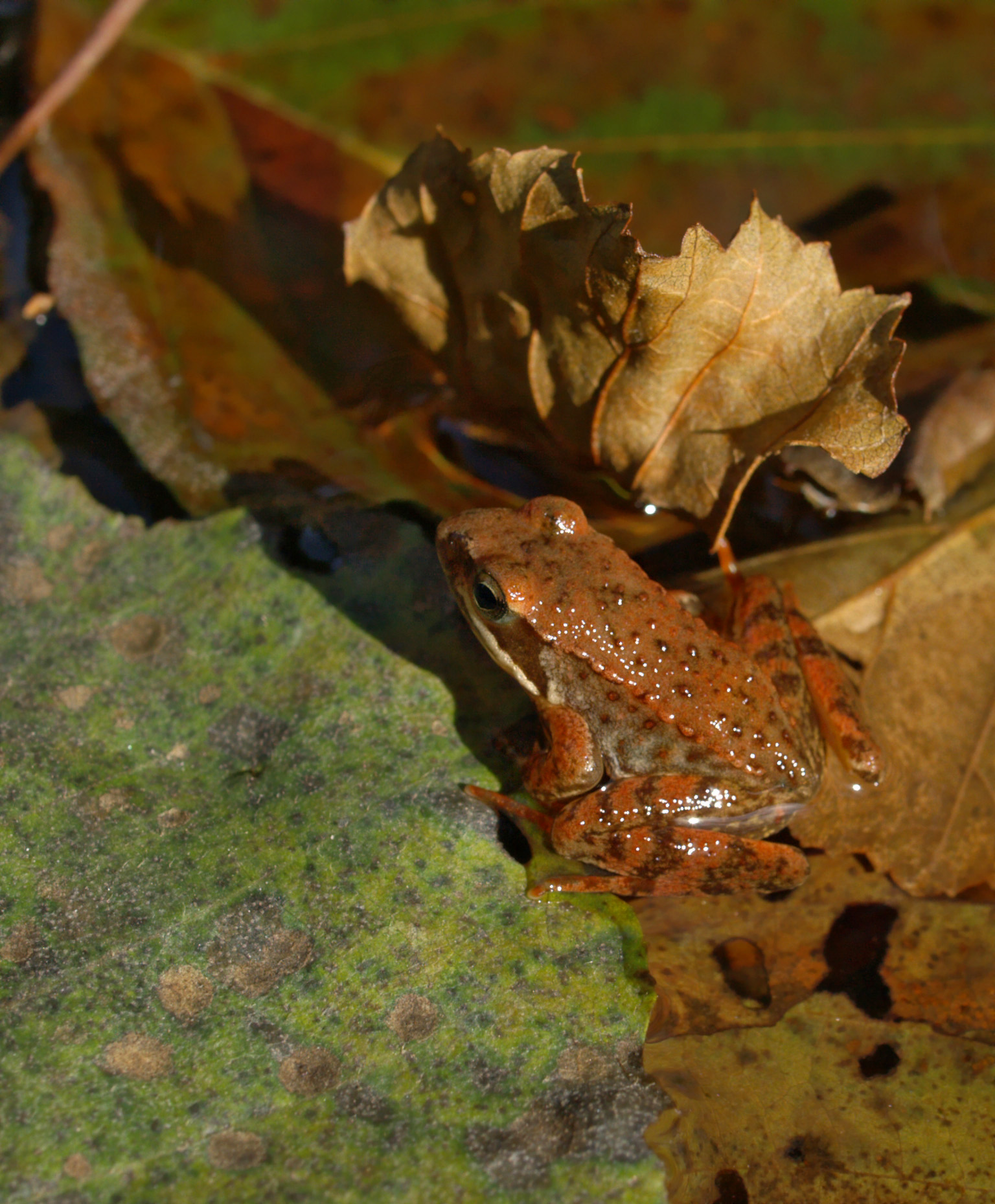 Ejemplar juvenil de rana patilarga (Rana iberica). Garganta del Vadillo, Losar de la Vera (Cáceres, España). 11-noviembre-2007.